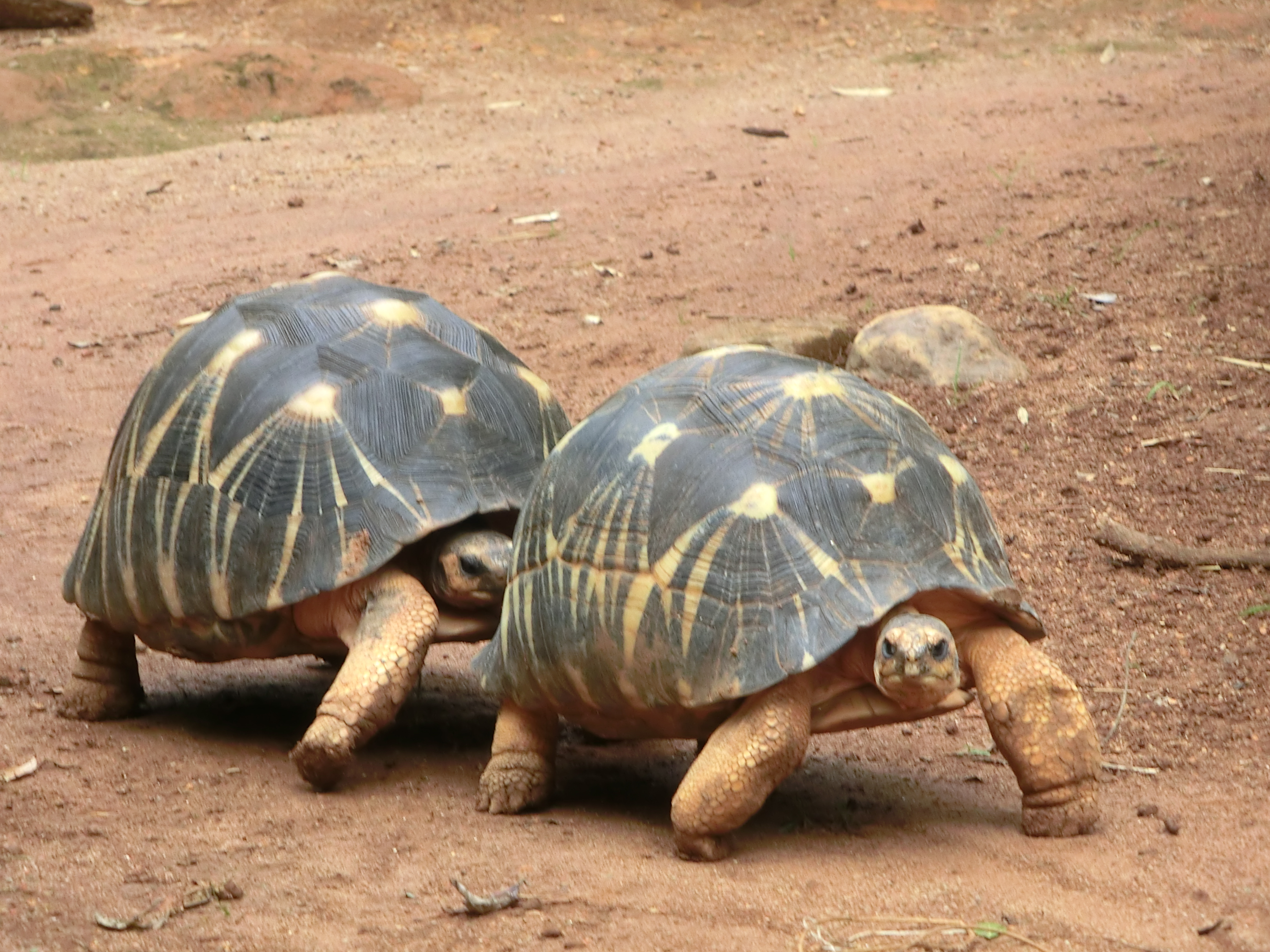 Geocheloni radiati Madagascar, nei pressi di Antananarivo